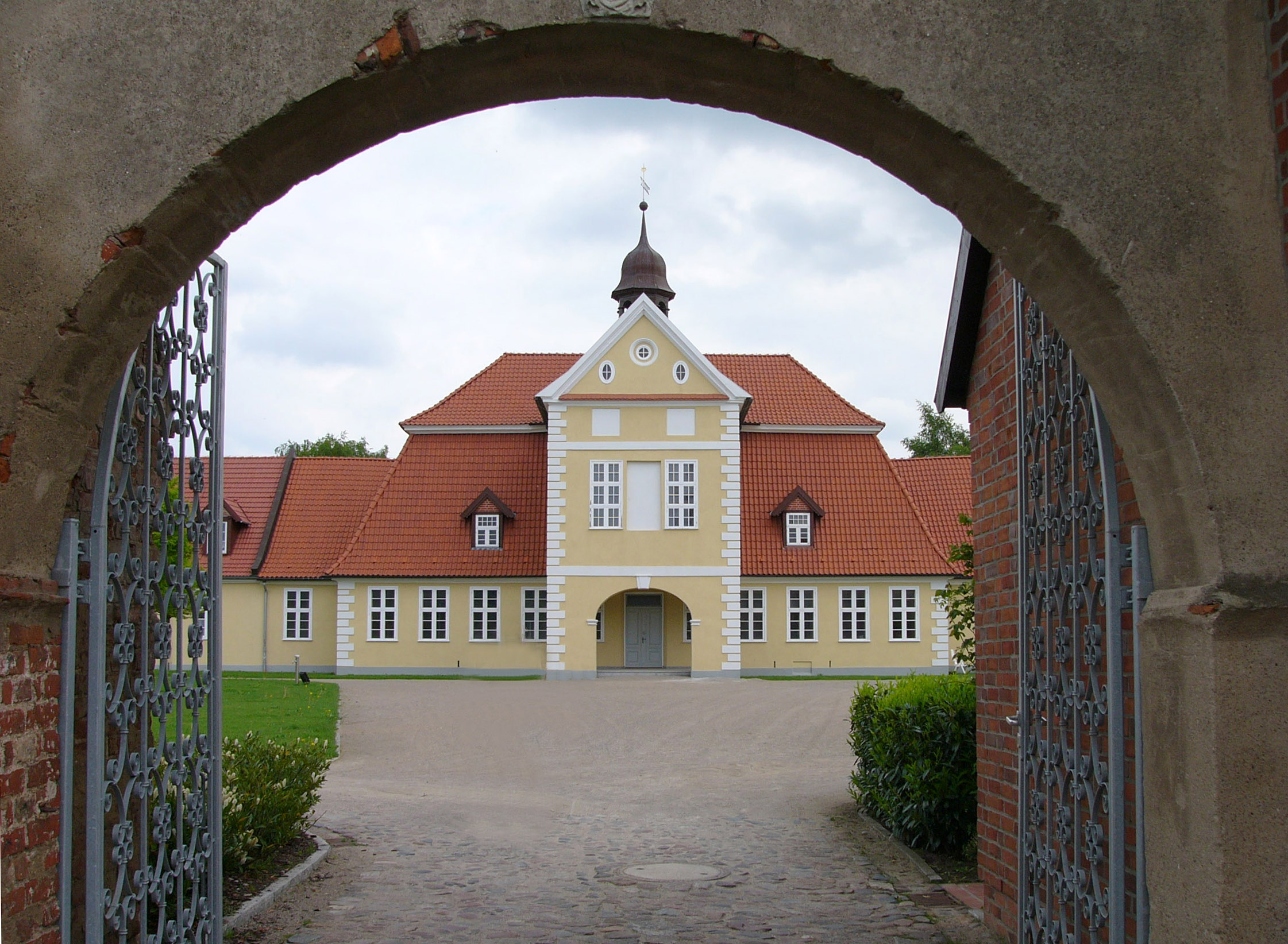 Adliges Fräuleinstift in Barth, Germany